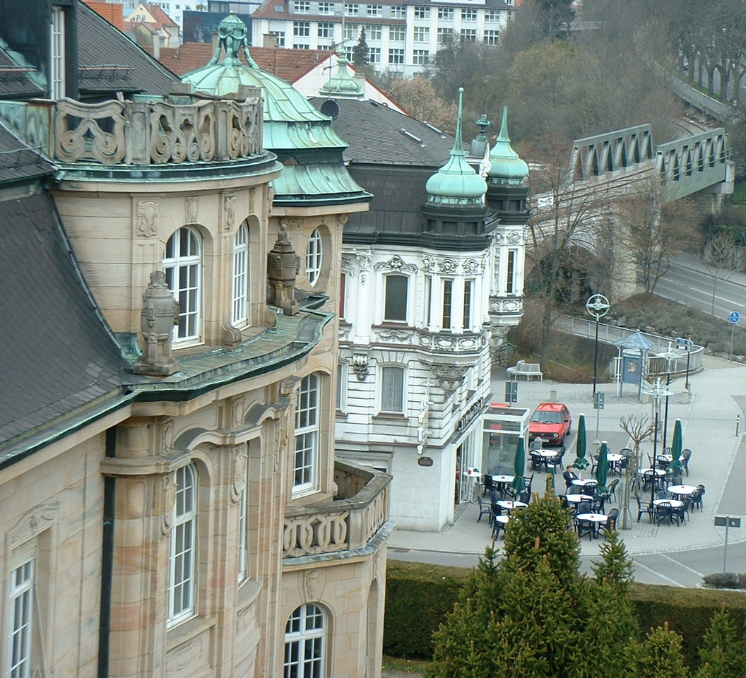 Neue und verschobene alte Villa Haux in Albstadt-Ebingen